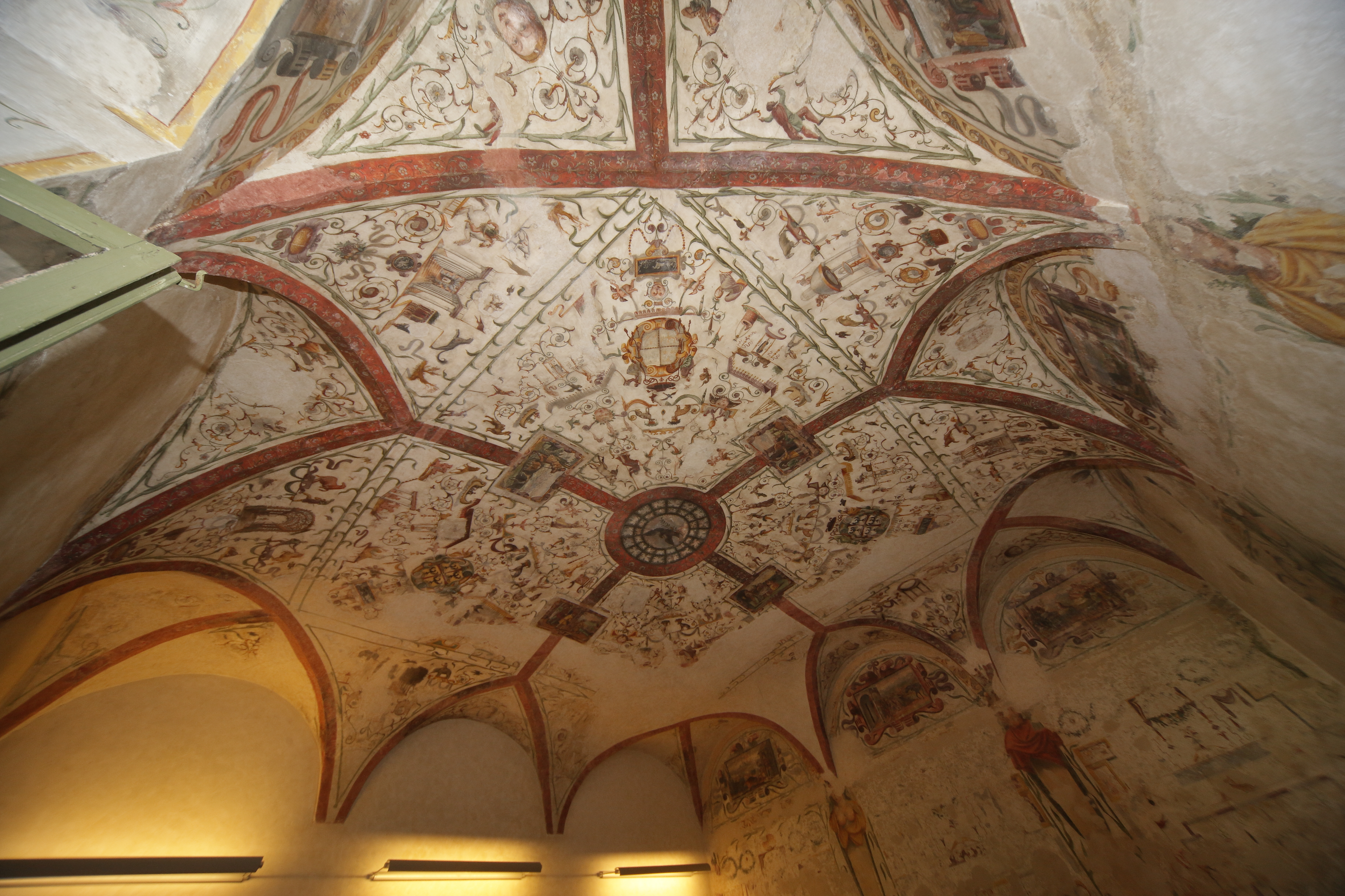 Rocca di Novellara: sala del fico soffitto restaurato. This is a photo of a monument which is part of cultural heritage of Italy.